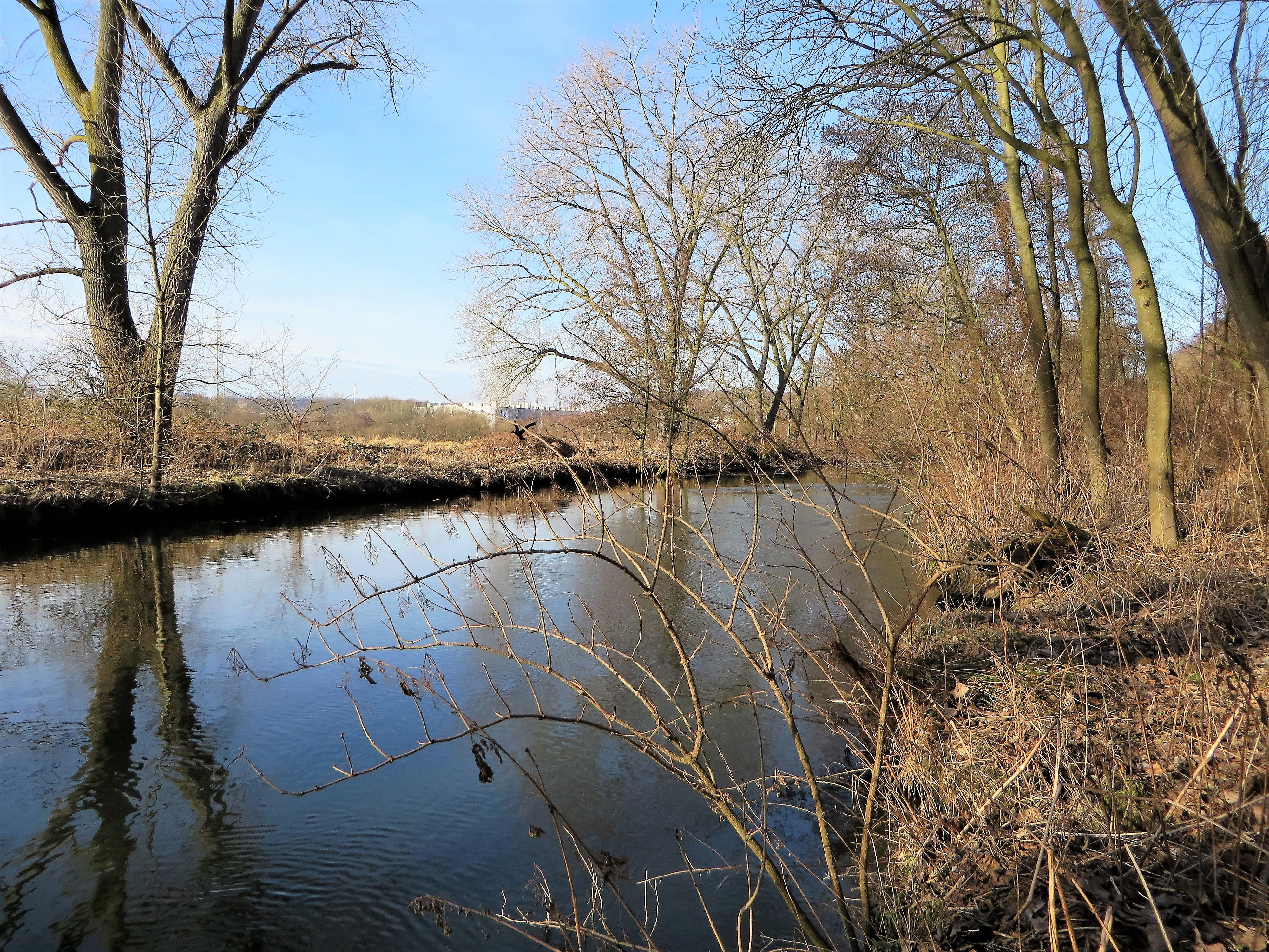 Naturschutzgebiet „Lenneaue Kabel“ (HA-008) in Hagen-Kabel, entlang der Lenne zwischen Schwerter Straße im Norden und Fleyer Bach im Süden. Es handelt sich um Uferzonen mit ausgeprägter Ufervegetation, Feuchtwiesen, einzelnen Althölzern und Auenwaldresten. Das Foto zeigt den Lennealtarm „Kuckkucksstrang“ neben der Verbandsstraße.